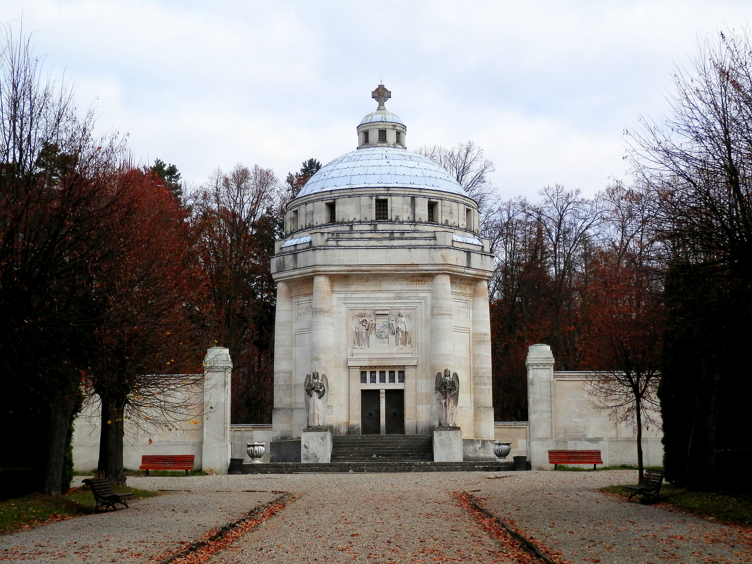 Mauzóleum Krásna Hôrka